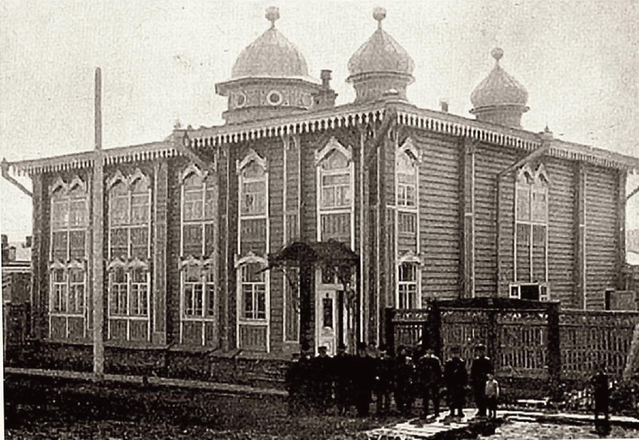 Солдатская синагога в Томске, 1910 год